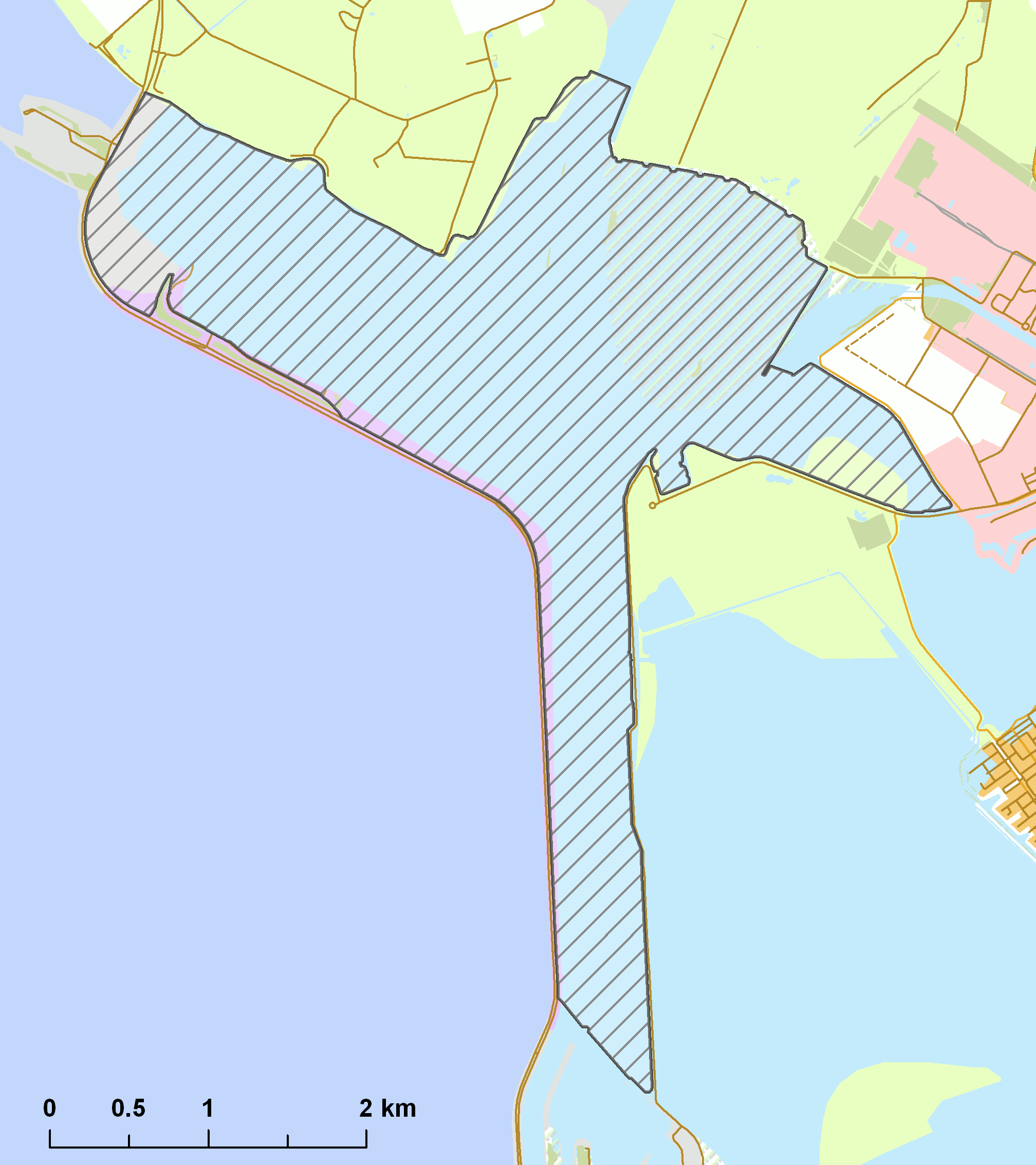 Natura2000 - Zoommeer.png